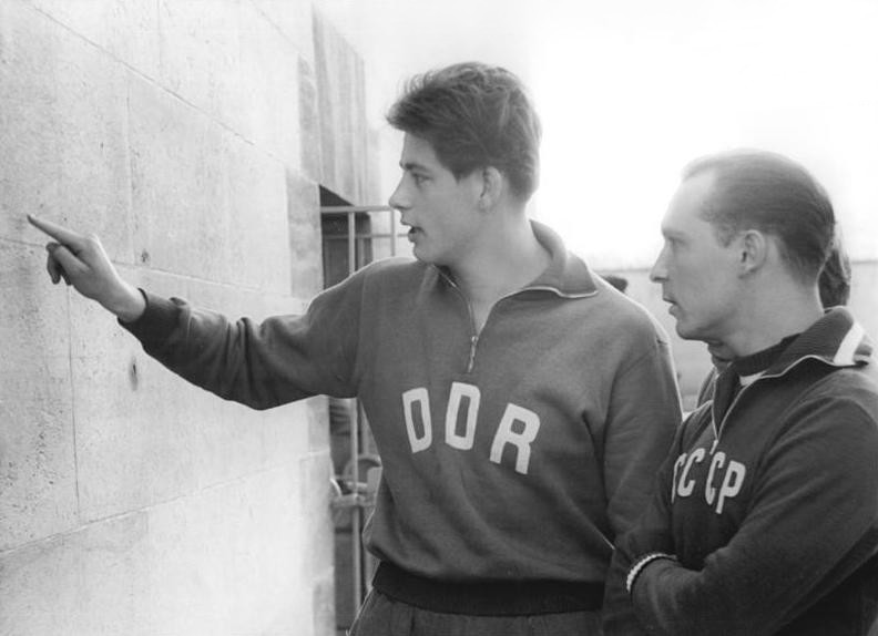 Hans Zierold, Sagaiduk Zentralbild Wlocka 15.9.1957 Schwimm-Länderkampf DDR-Sowjetunion Vom Freitag bis Sonntag, dem 13.-15.9.1957, findet in Leipzig der Schwimm-Länderkampf zwischen der DDR und der Sowjetunion statt. UBz: Nach dem 200-m-Schmetterlingsschwimmen. Der Deutsche Hans Zierold schwamm mit 2:21,4 min. einen neuen Europarekord und unterhält sich mit dem Zweitplazierten, Sagaiduk (UdSSR, rechts).